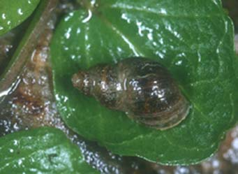 Galba truncatula